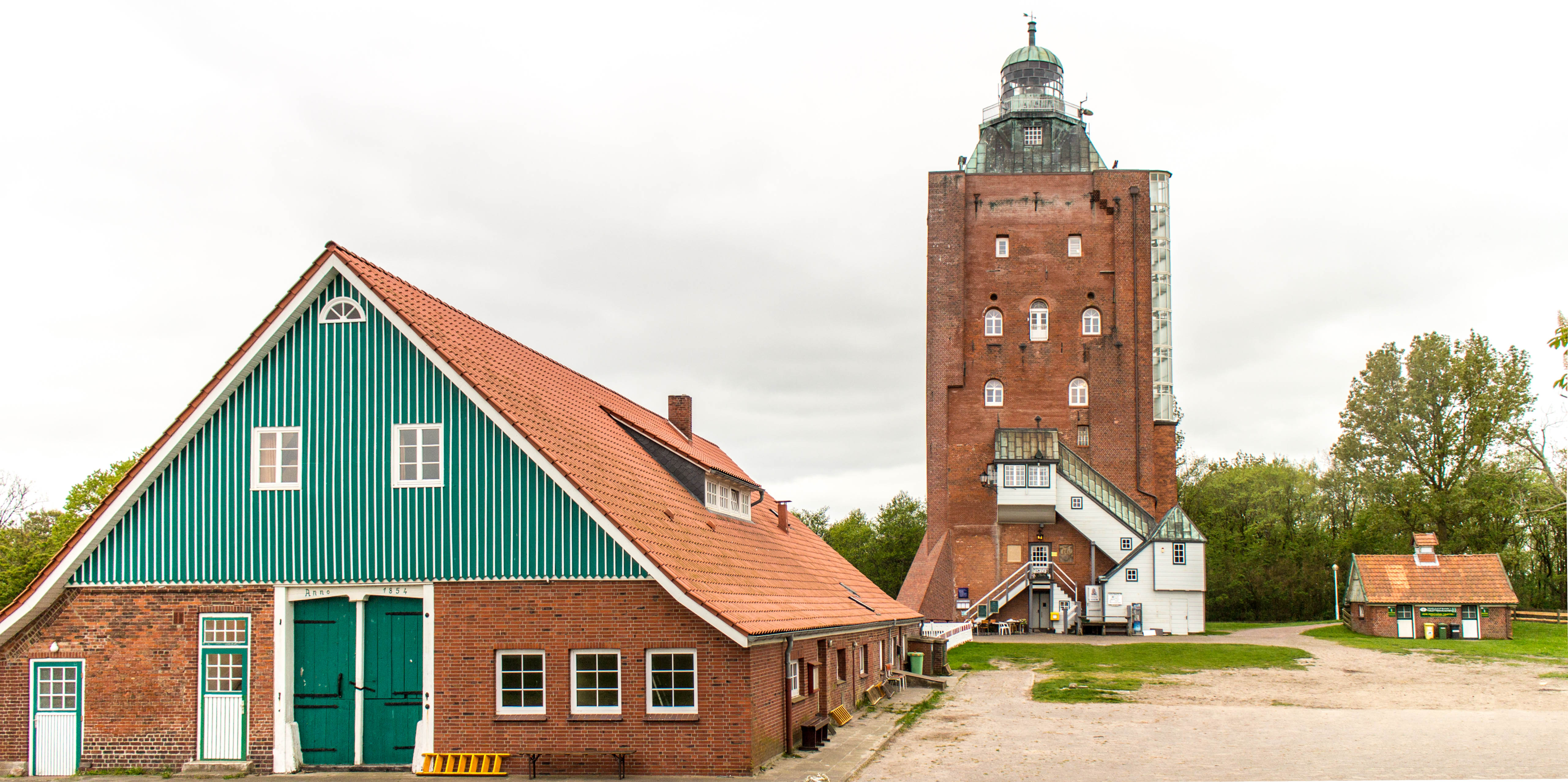 Gebäudeensemble der Turmwurt Neuwerk: Staatscheune, Großer Leuchtturm und Schulgebäude (von links nach rechts). (Das Bild wurde retouchiert und perspektivisch manipuliert) This is a photograph of an architectural monument.